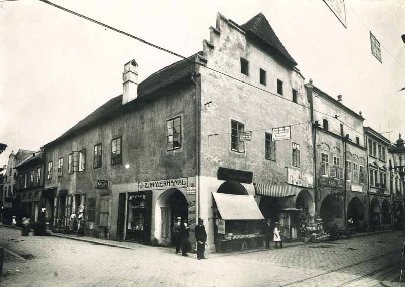 Ettmayerův dům mezi lety 1908 a 1911 v místě pozdější budovy Budějovické spořitelny (dnes využívané komerční bankou) naproti Masným krámům na rohu Krajinské a Hroznové ulice.